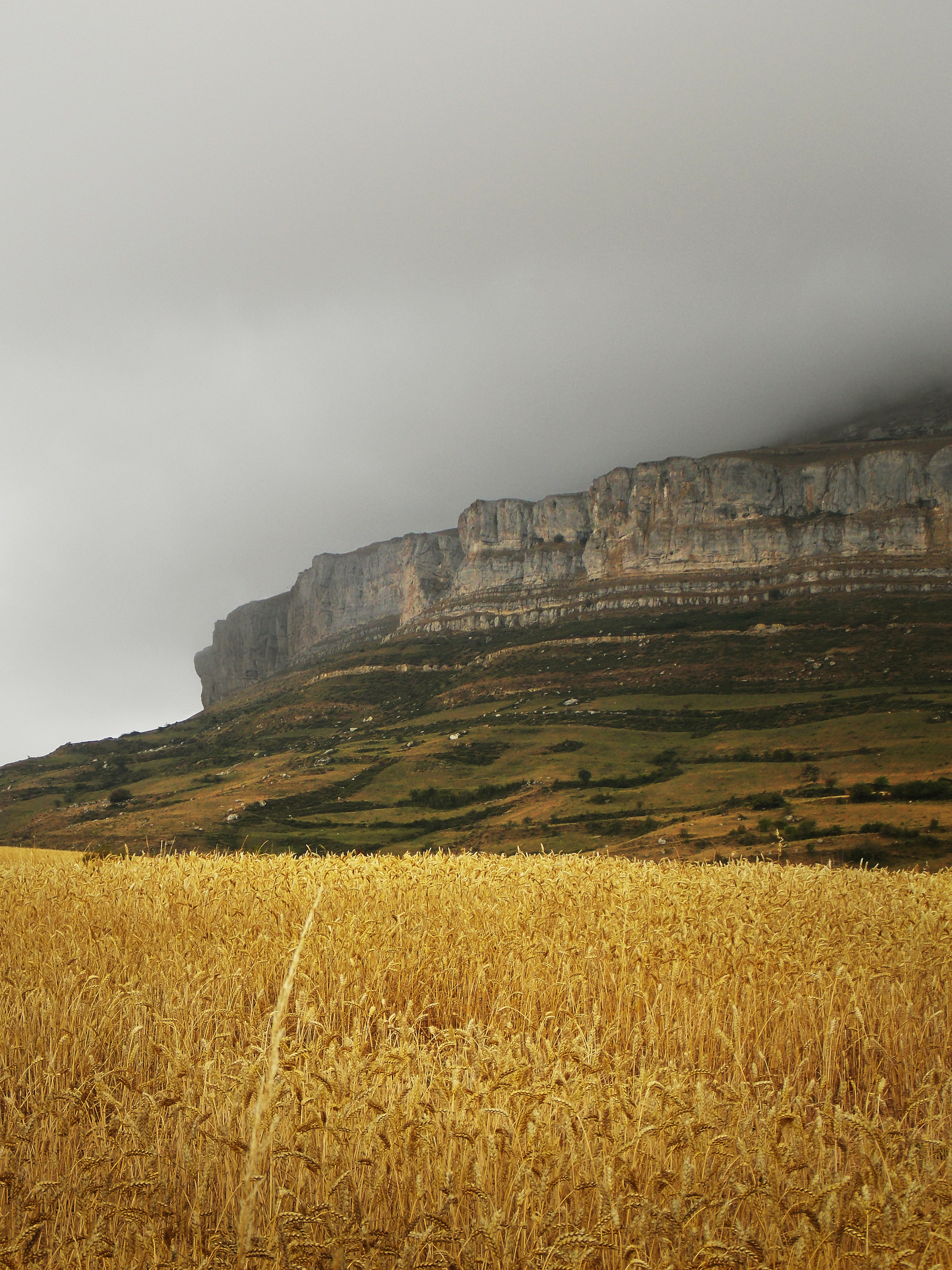 Desde la carretera BU-623 entre Villamartín de Villadiego y el pueblo de Amaya, casi llegando ya al segundo. Amaya era una antigua ciudad cántabra sobre el macizo que lleva su nombre, hoy al norte de la provincia de Burgos. El castro se convirtió en una fortaleza y después en una ciudad visigoda, capital del Ducado de Cantabria. Mi artículo sobre Amaya en Jot Down: Más en Wikipedia: (ciudad) En Google Maps